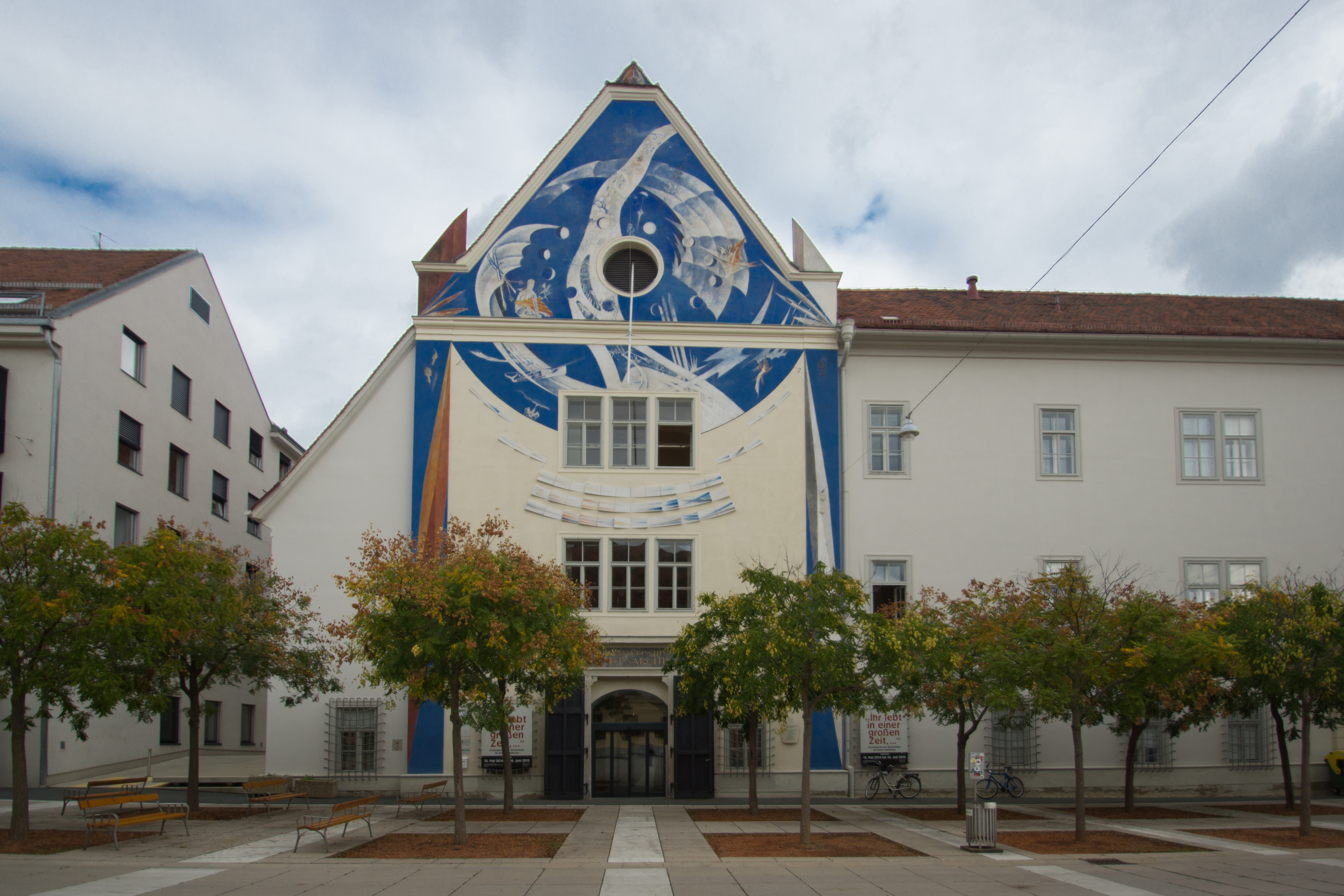 Antiguo Covento Carmelita